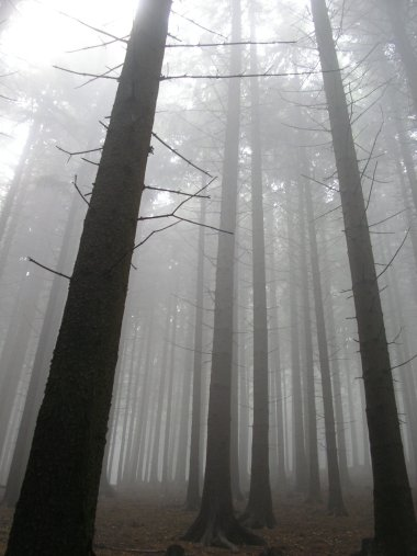 Nebelwald (Picea abies) im Sauerland